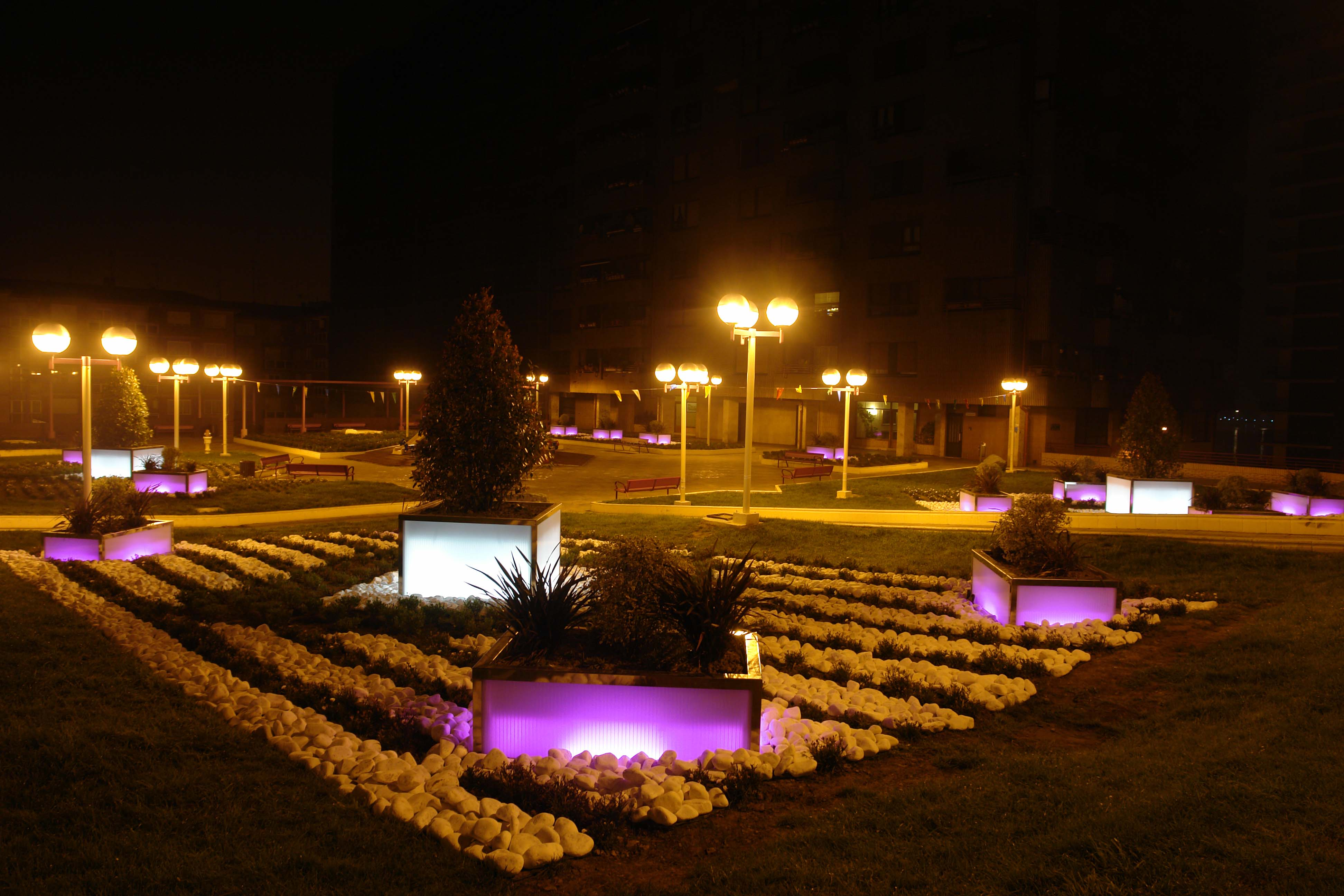 Plaza Señorío de Vizcaya